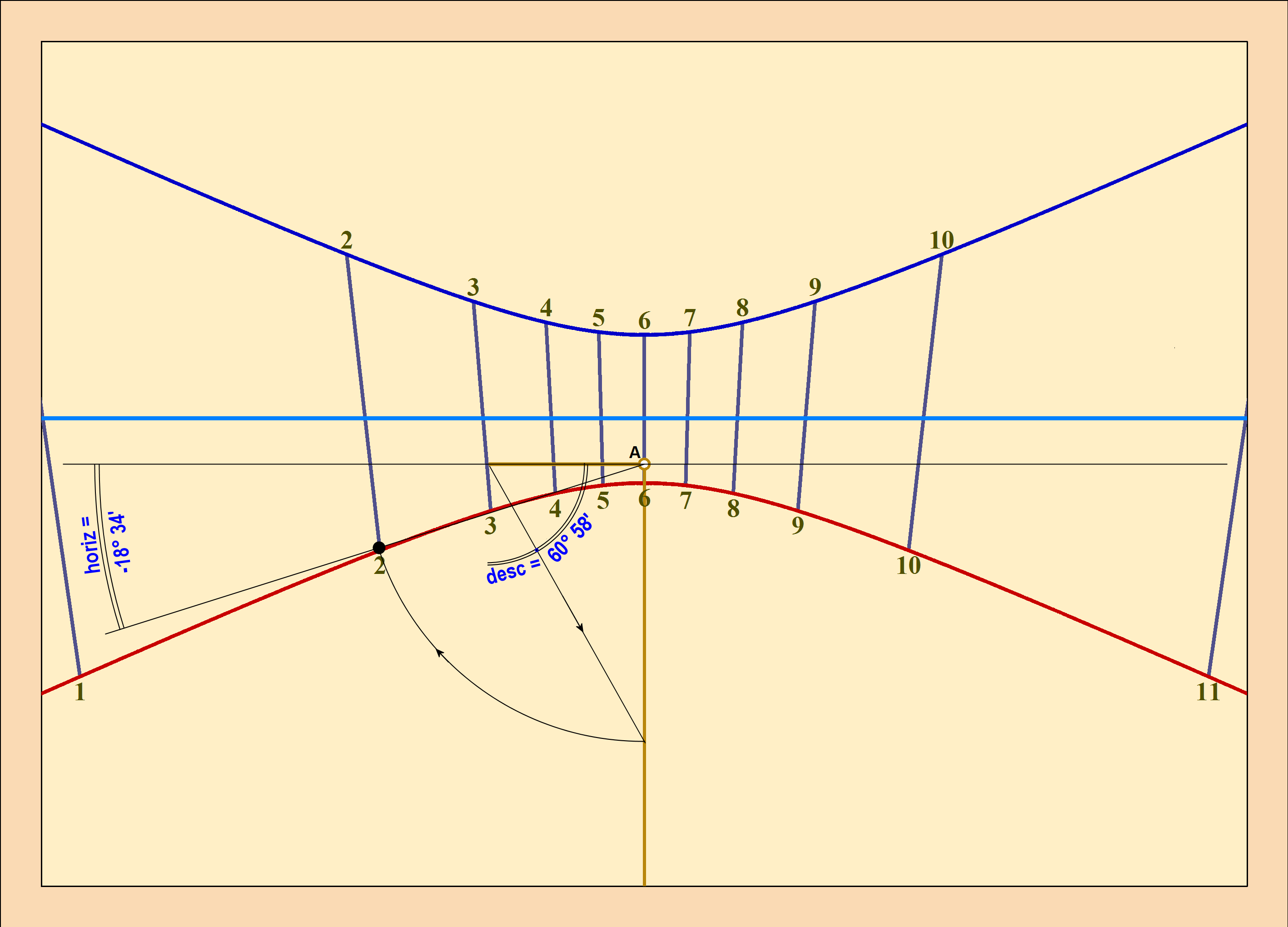 Schéma de construction du point de 2 h sur un cadran horizontal d'heures temporaires au solstice d'été pour une latitude de 16° 27' (d'après la table de Ptolémée).